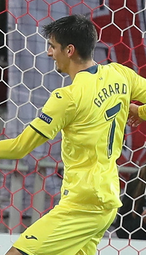 Испанский клуб с помощью судьи уходит от поражения на последних минутах в матче «Спартак» — «Вильярреал»